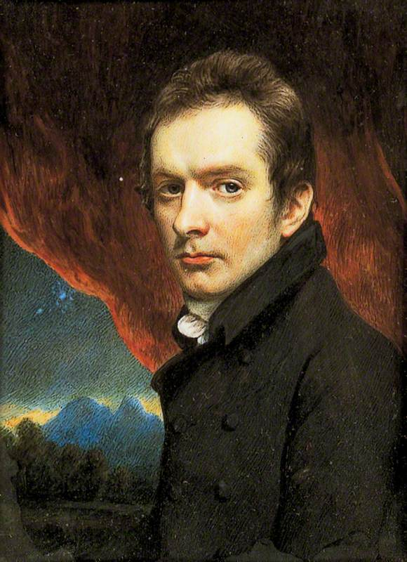 Self-portrait